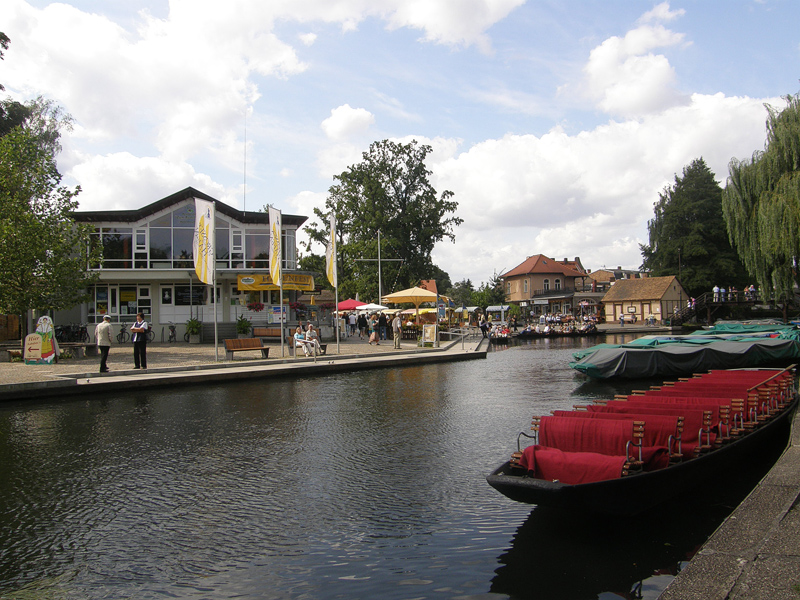 Bilder aus dem Spreewald